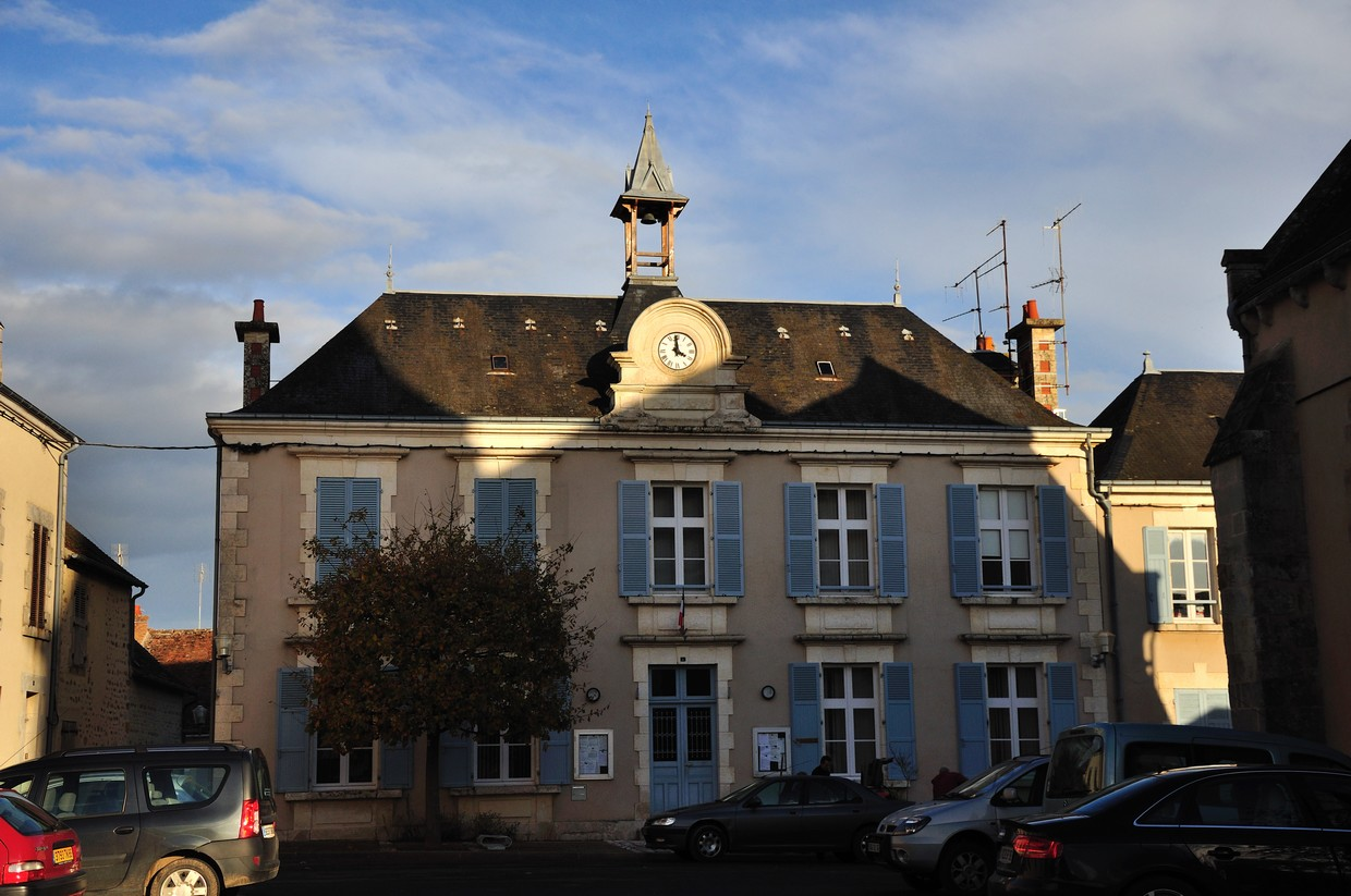 Lignac (Indre) - Mairie